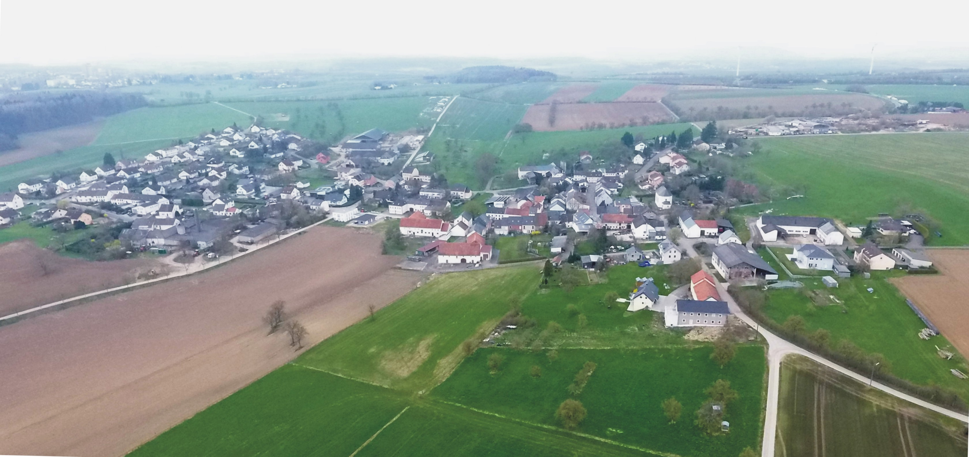 54634 Matzen, östlich des Ortes. Luftbild von Matzen bei Bitburg. Aufnahme von 2018.